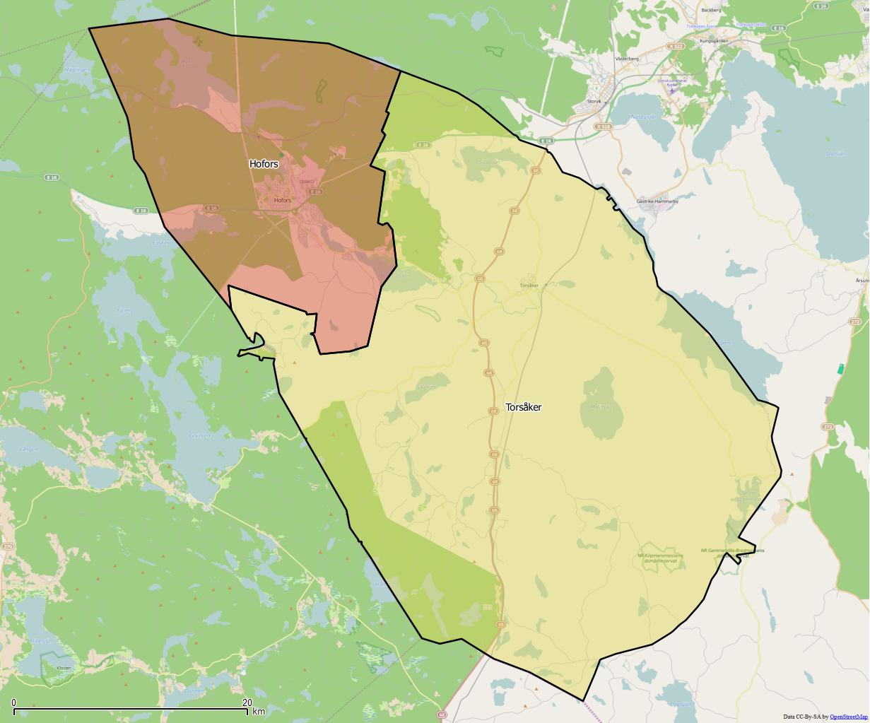 Distriktsindelningen i Hofors kommun